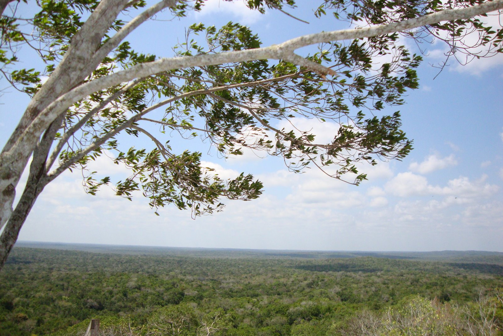 Selva vista desde la cima de la Pirámide de La Danta, El Mirador.